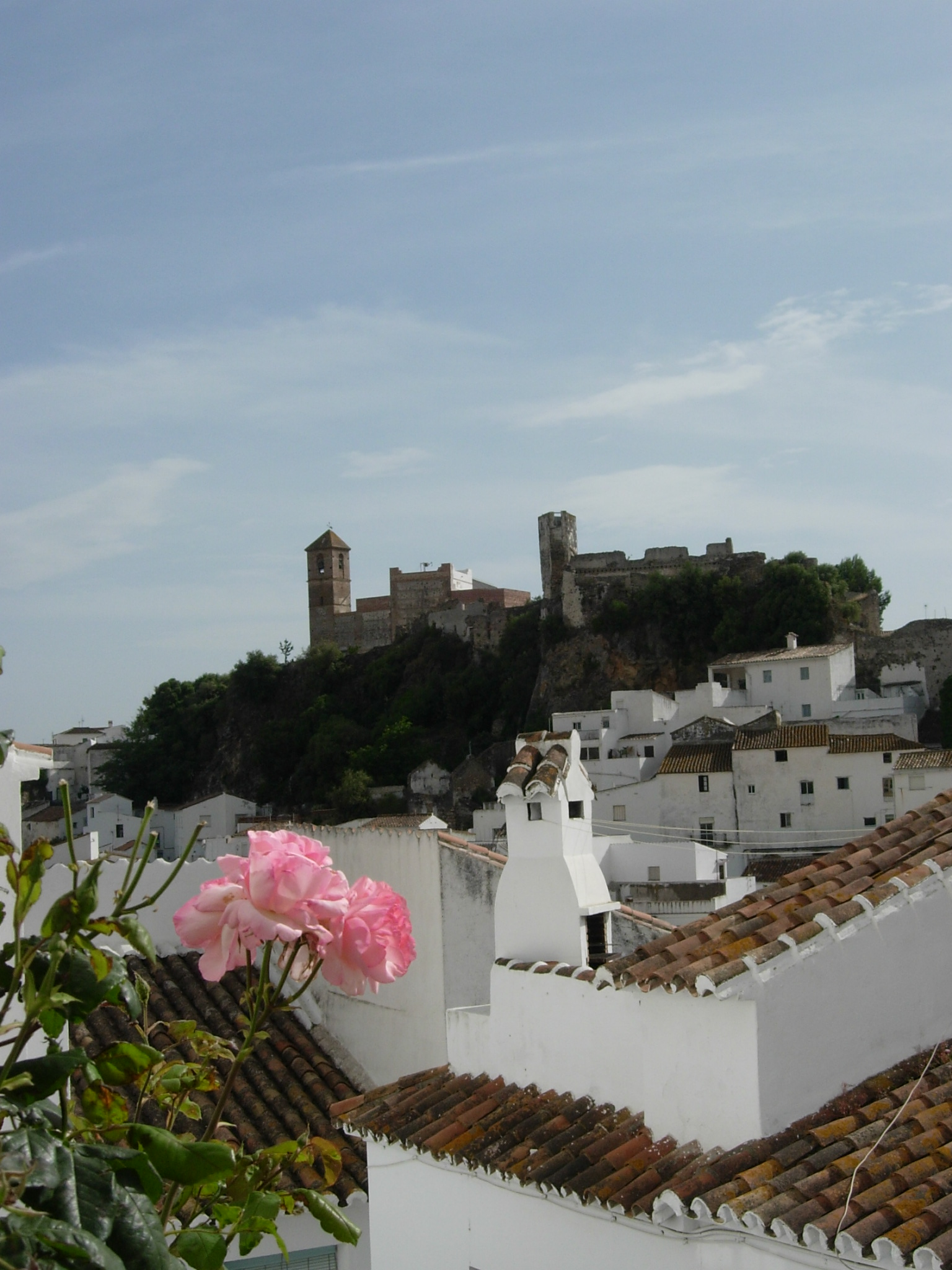 Casares por Juampa Mola